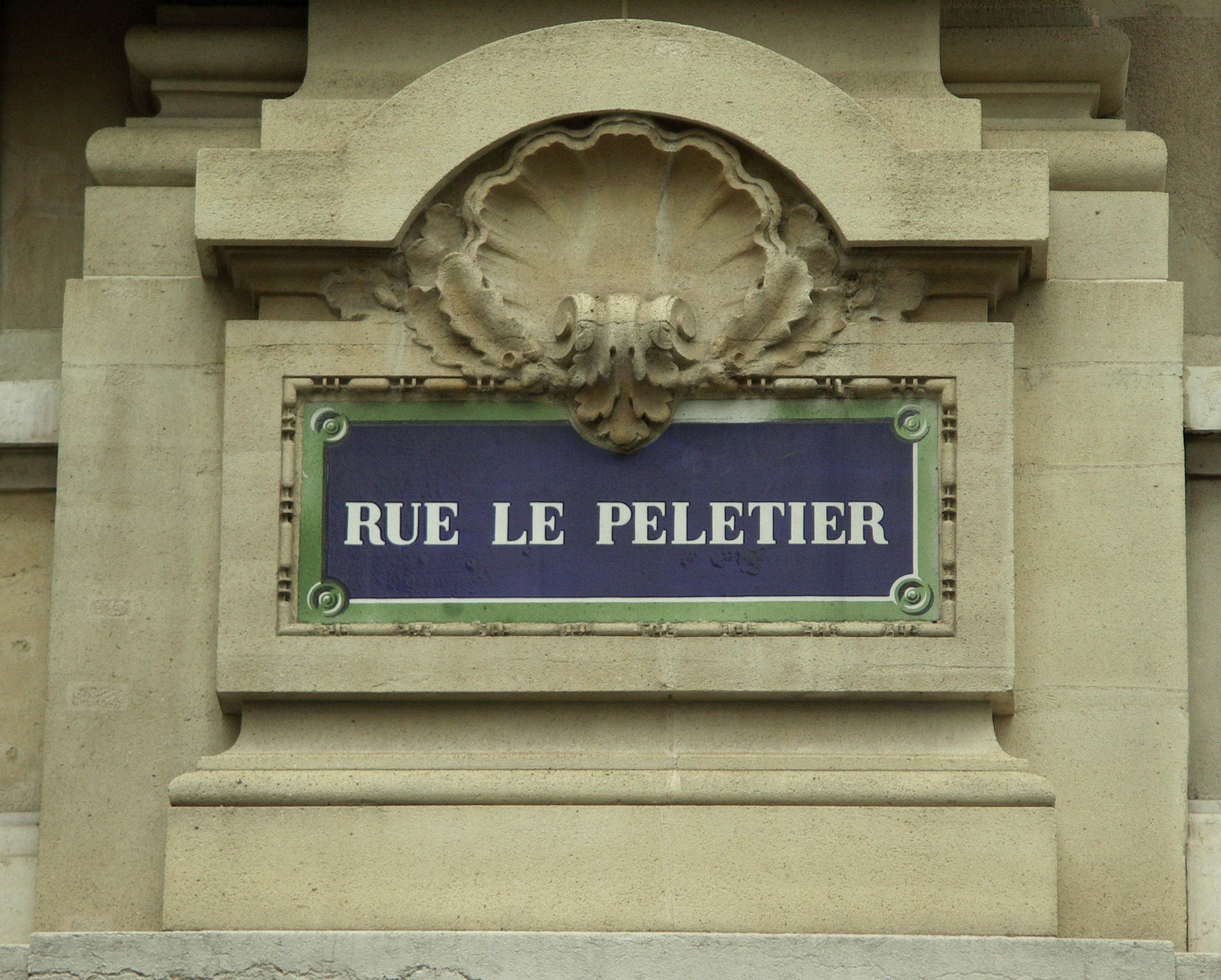 Plaque de nom de rue de Paris intégrée dans la décoration de la façade. Immeuble de la fin du 19e siècle.